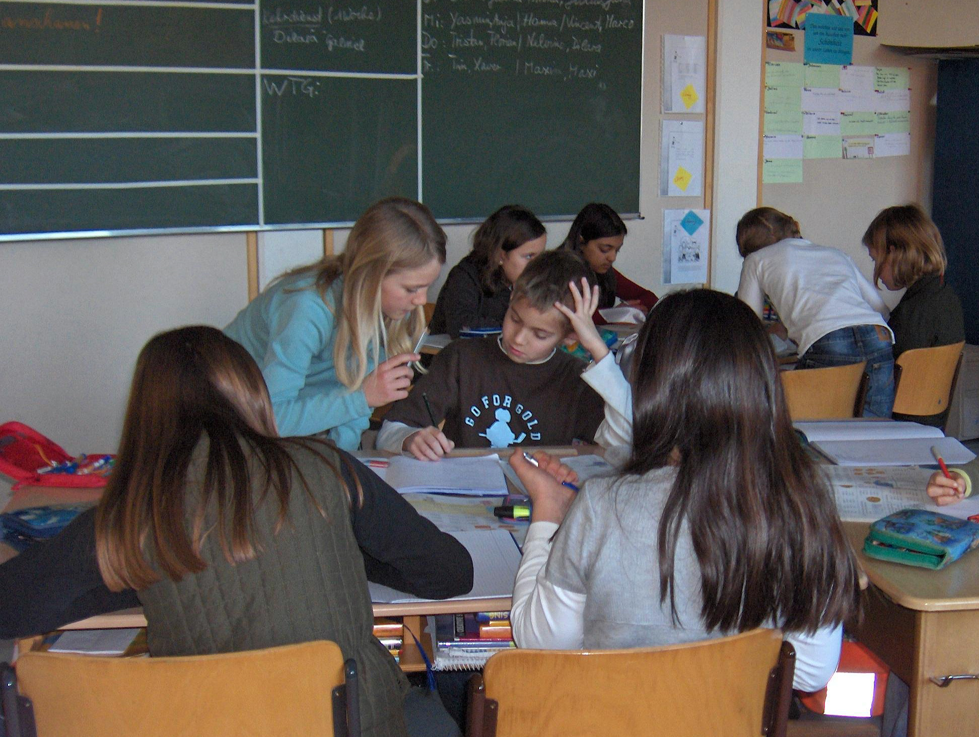 Matheunterricht nach LdL in der Grundschule